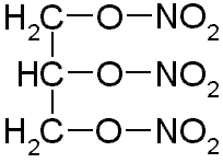 strukturní vzorec nitroglycerinu z cs::pl:Grafika:Nitrogliceryna.png